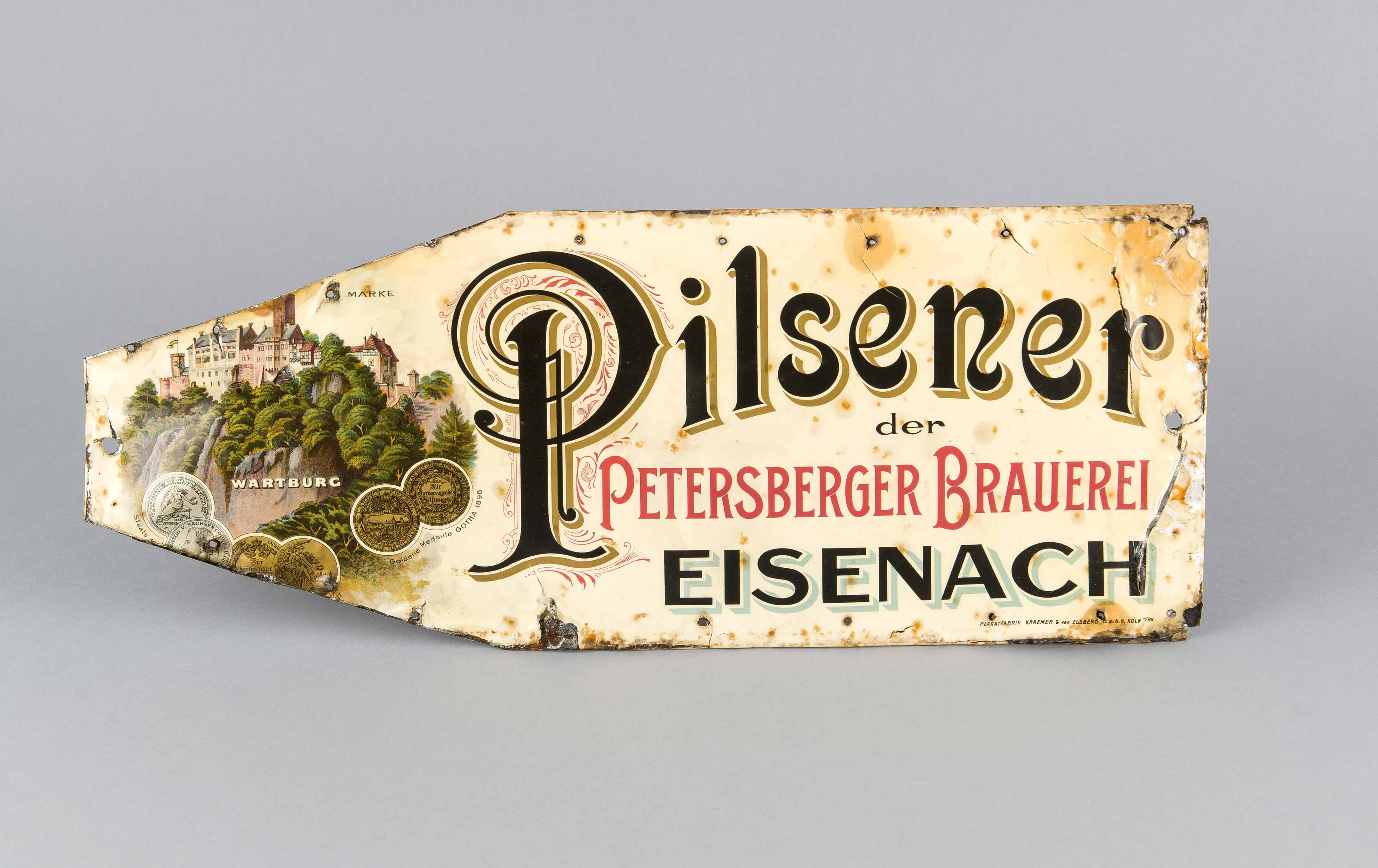 Reste eines Werbeschilds der Petersberger Brauerei Erbslöh in Eisenach